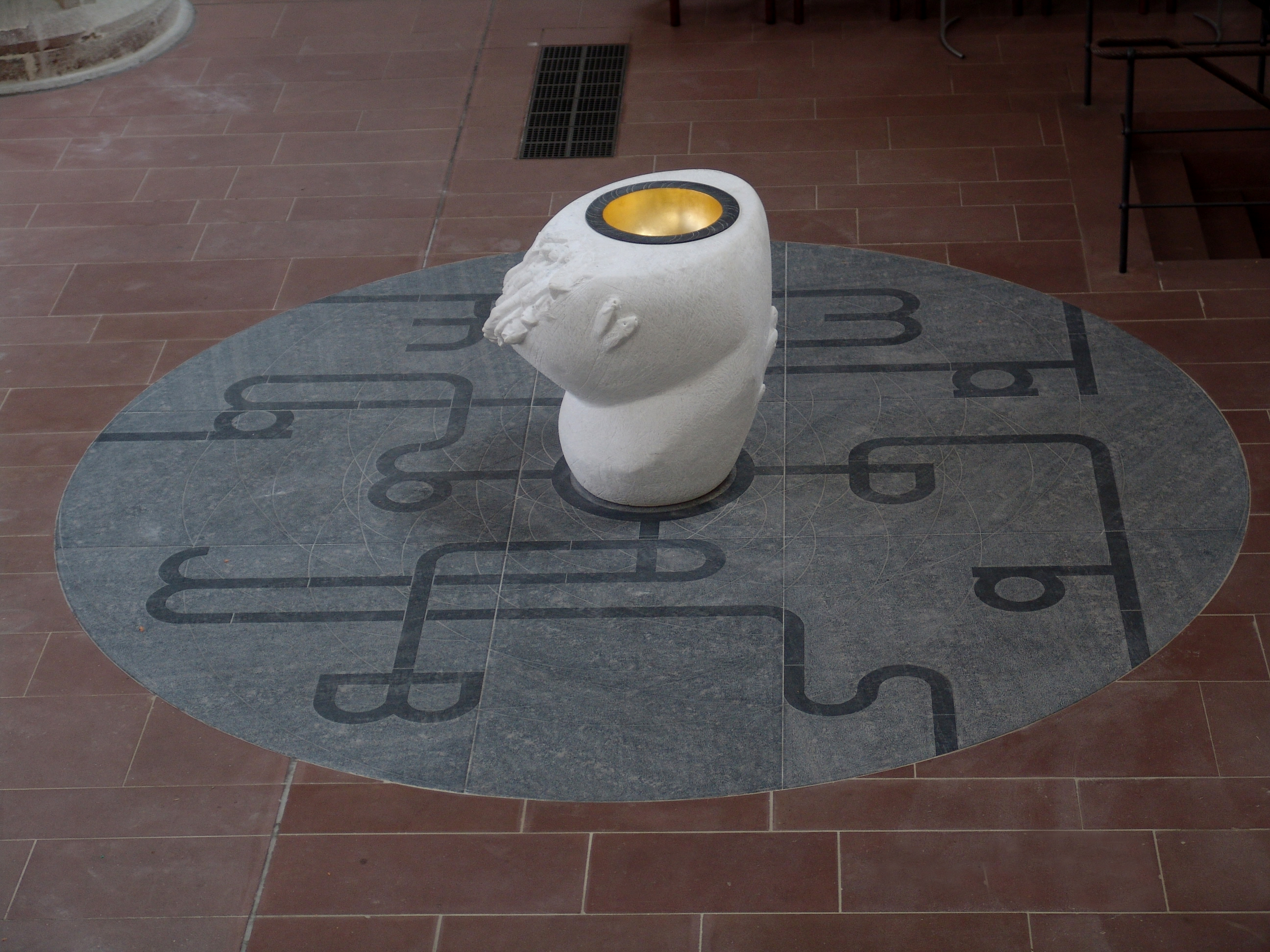 Taufstein von Prof. Carl-Constantin Weber in der Aegidienkirche Braunschweig